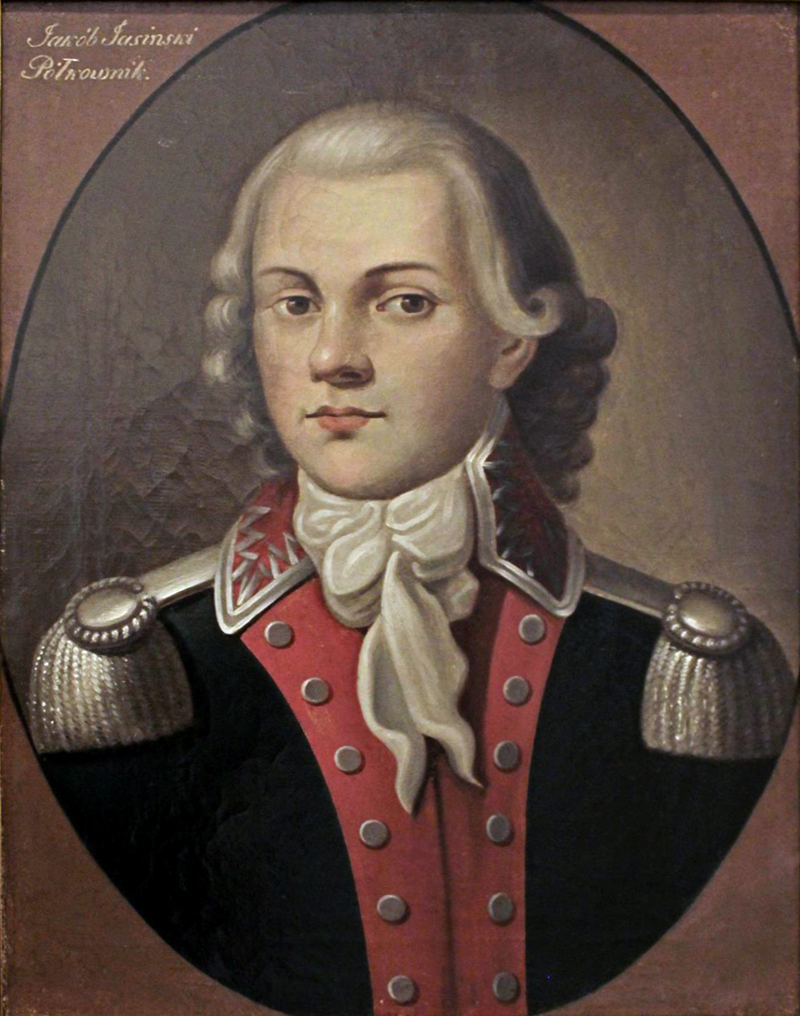 Беларуская (тарашкевіца): Партрэт Якуба Ясінскага (Jakub Jasinski)